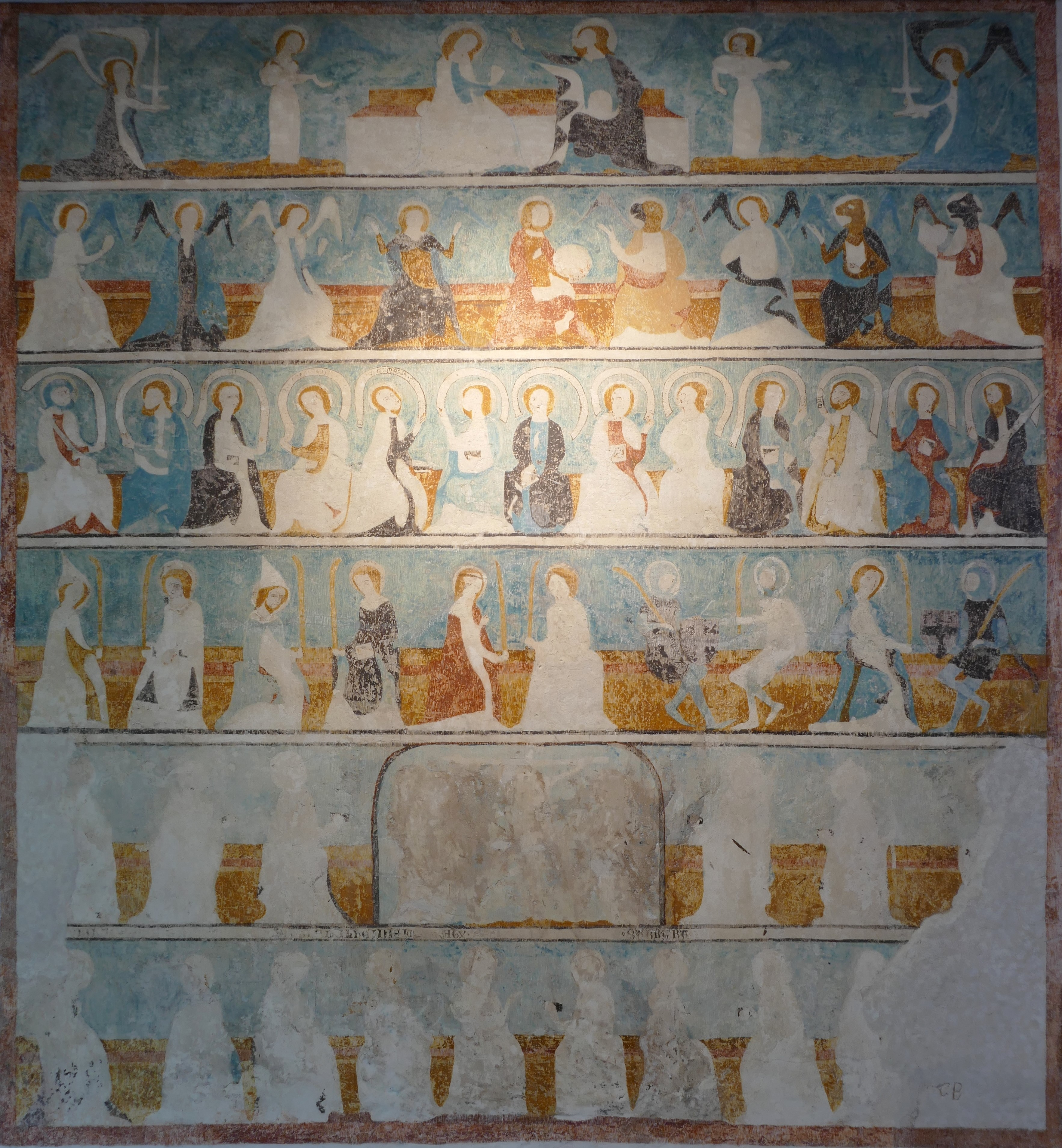 Alsace, Bas-Rhin, Wissembourg, Église protestante Saint-Jean, place Martin Bucer (PA00085246, IA67008033). Fresque de la chapelle Sainte-Catherine (XIVe): "Christ et Vierge, Evangélistes, saints et saintes, anges et Crucifixion".